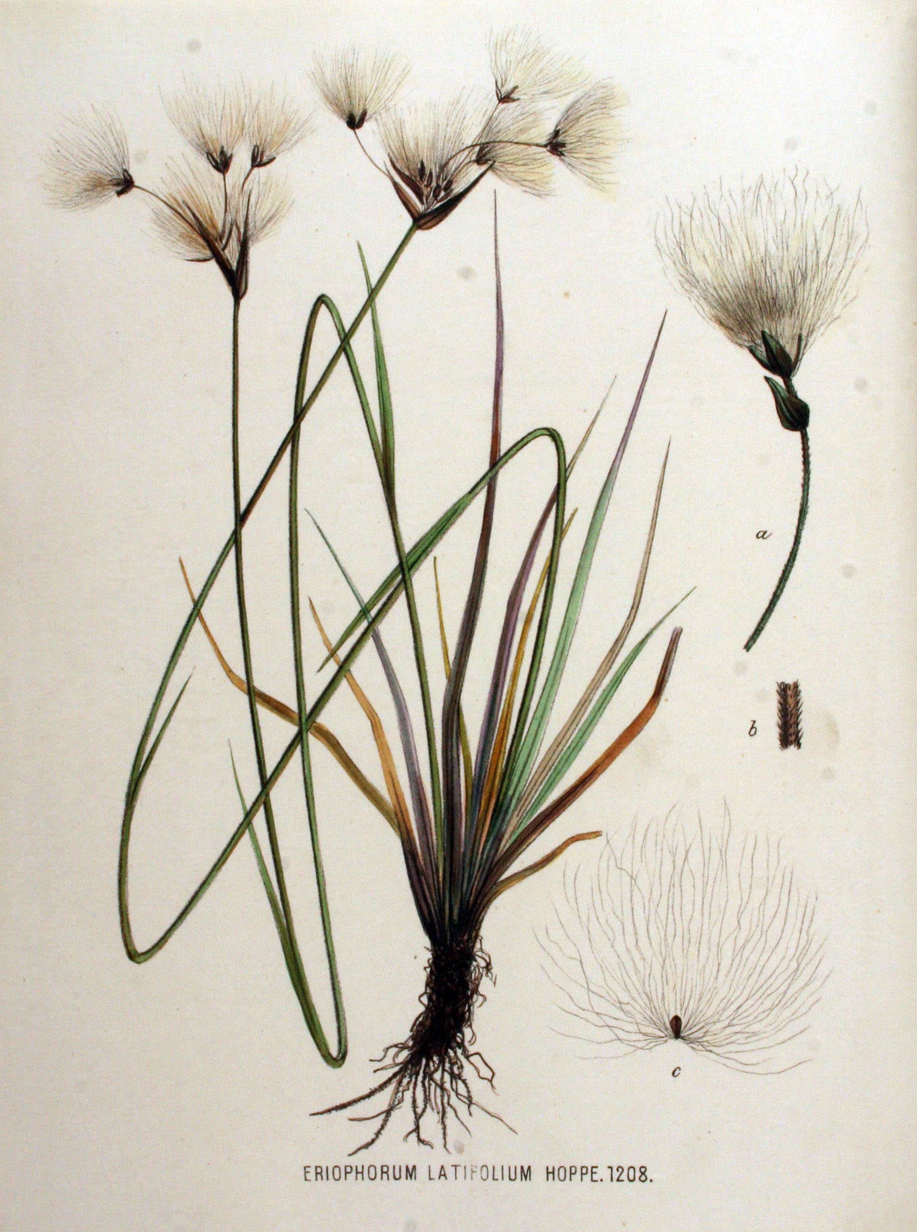 Eriophorum latifolium Hoppe